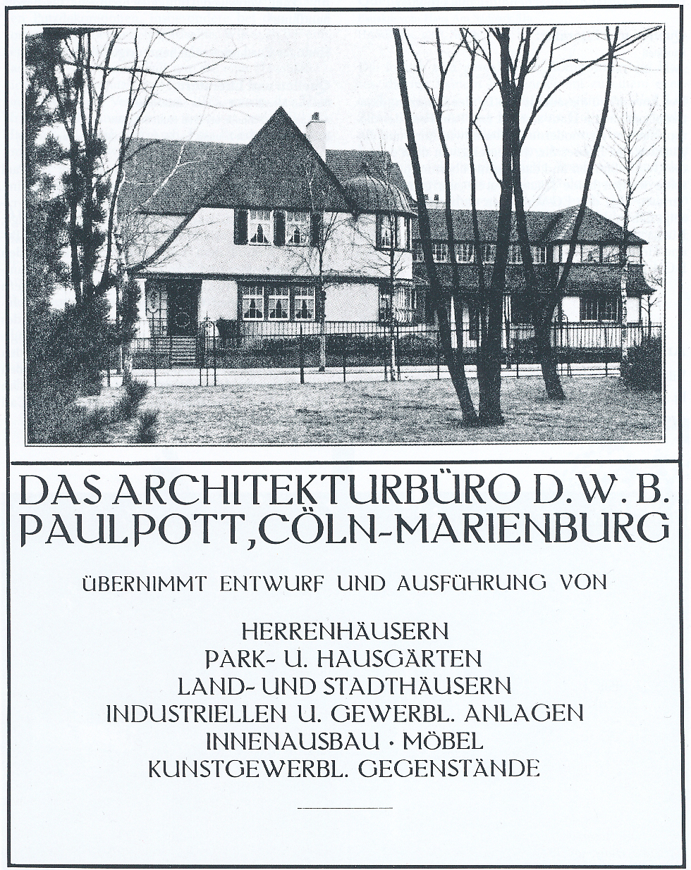 Paul Pott, Architekt in Köln, Werbeanzeige aus 1913 Die Vereinigung für Kunst in Handel und Gewerbe Cöln löste sich bereits wenige Jahre nach der Veröffentlichung auf (Erster Weltkrieg).